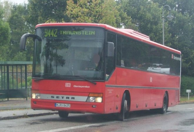 Ein Überlandbus Typ Setra S 315 UL (Facelift-Modell) der Regionalverkehr Oberbayern GmbH (RVO) / DB Oberbayernbus unterwegs auf der Linie 9442 Garching - Traunstein am 9. August 2013 in Matzing (Stadt Traunreut). Der Bus trägt am Heck eine Werbung.